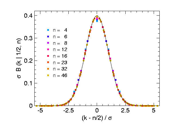 selbstgezeichnet